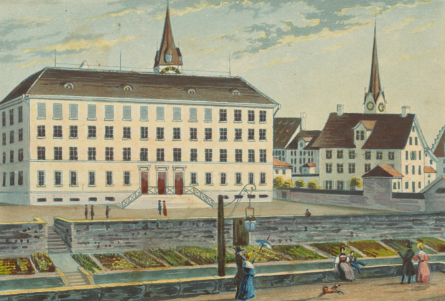 Kolorierte Druckgraphik (Aquatinta). Links im Bild der erste Sitz der Universität Zürich, das sogenannte umgebaute «Hinteramt» des ehemaligen Augustinerklosters. Dieses diente von 1835 bis 1864 als Universitätsgebäude.